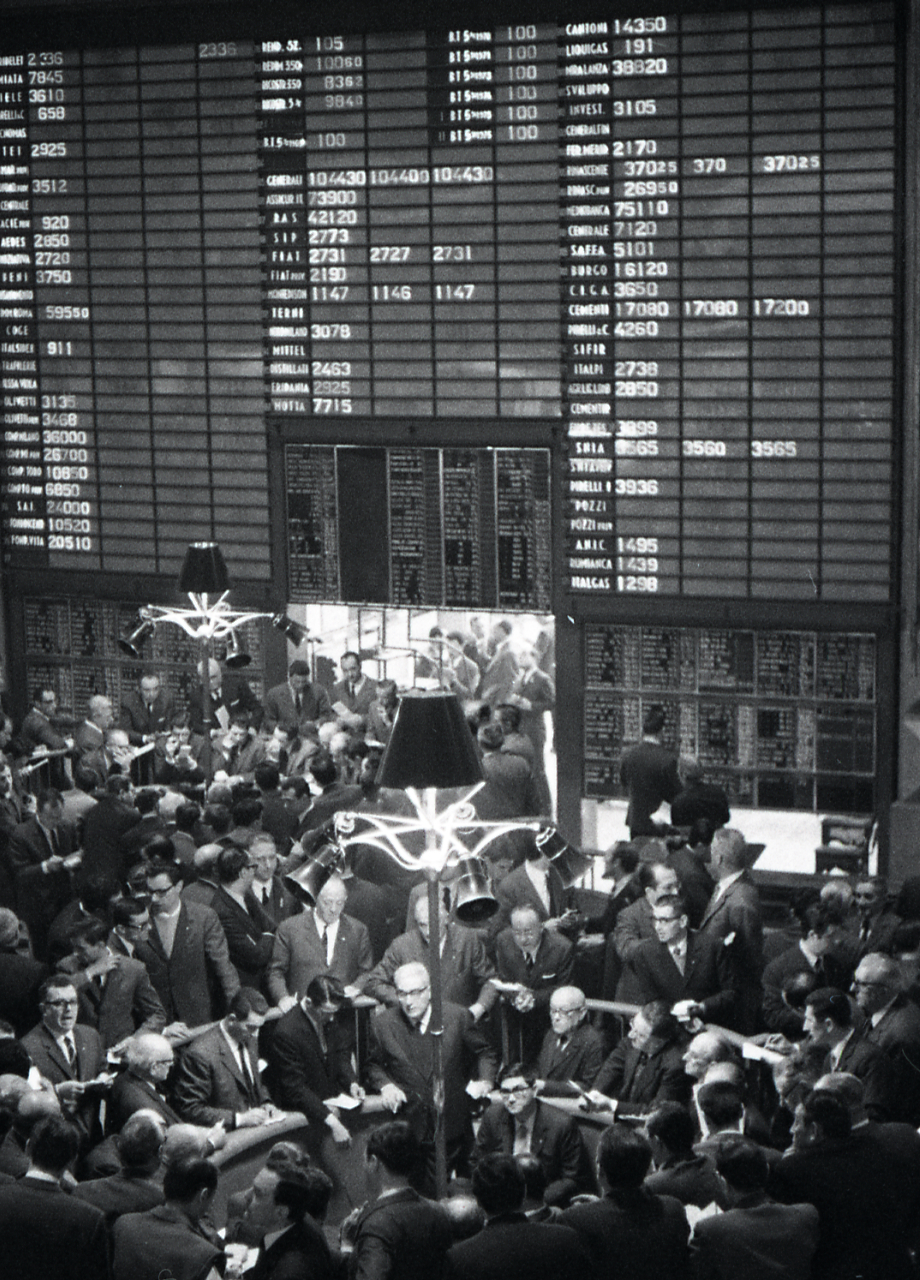 Servizio fotografico : Milano, 1968 / Paolo Monti. - Strisce: 5, Fotogrammi complessivi: 27 : Negativo b/n, gelatina bromuro d'argento/ pellicola ; 35 mm. - ((I fotogrammi hanno una doppia numerazione. . - Sul portanegativi: HPS Ilford Minolta 1:1,4. - Occasione: Per Studio Boggeri n°15 fotografie sulla Borsa Titoli di Milano e alcune varianti delle stesse. - Fonte: Fattura di Paolo Monti: IV. Commesse/ Fattura (1966-1971), presso Archivio Paolo Monti